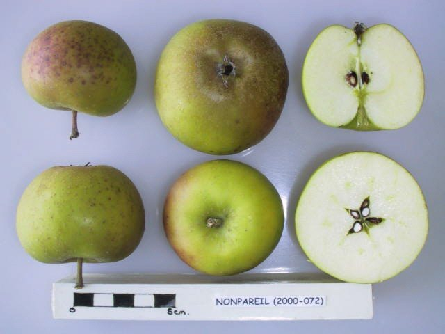 Non Pareil